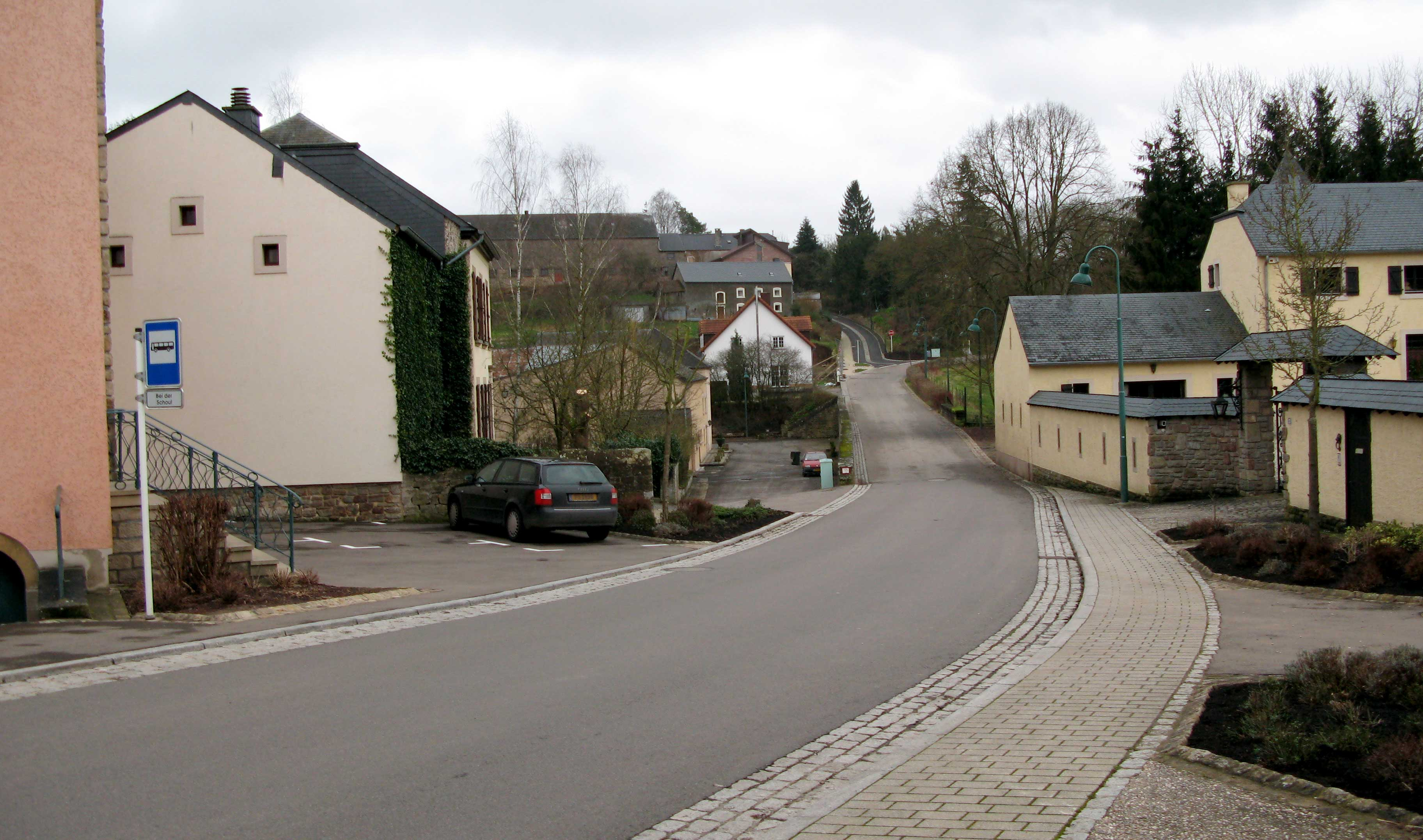 Une rue du village luxembourgeois de Schrondweiler